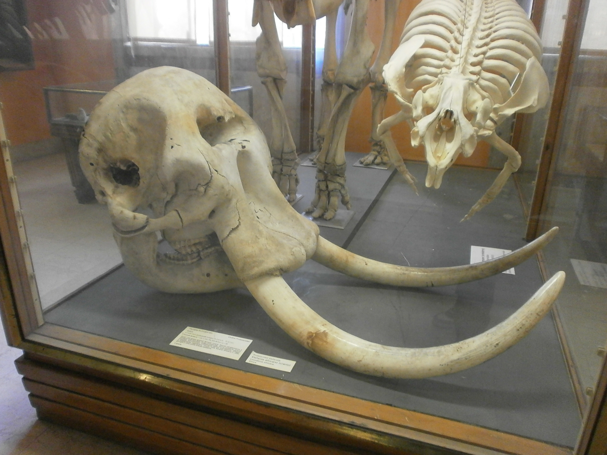 Cranio di elefante africano - Museo civico di storia naturale (Milan)